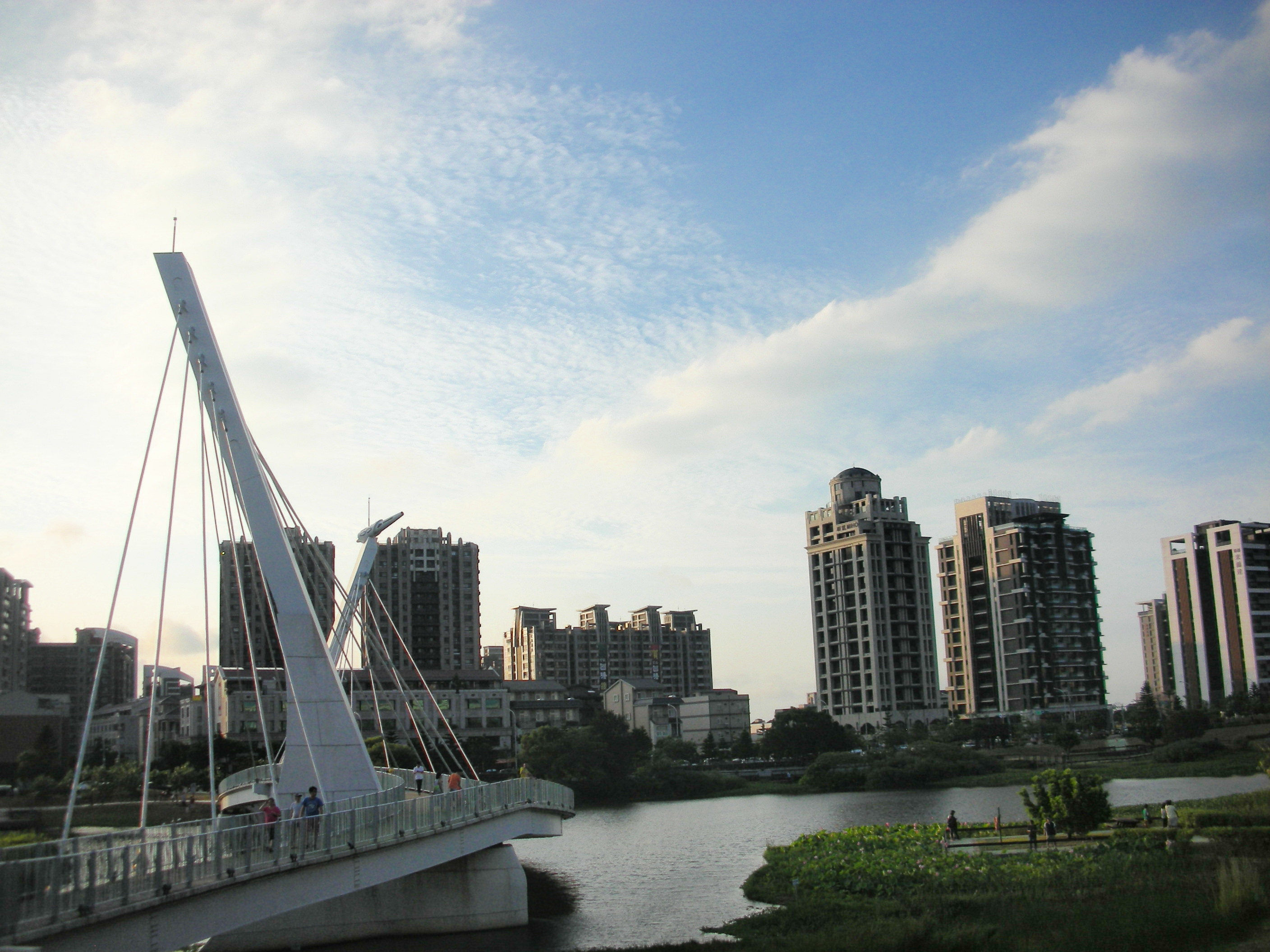 「青塘園」在台灣高鐵桃園站附近，原本是一座農業灌溉用的埤塘，有調節防洪的功能，經過規劃之後，成為都市民眾的親水空間。